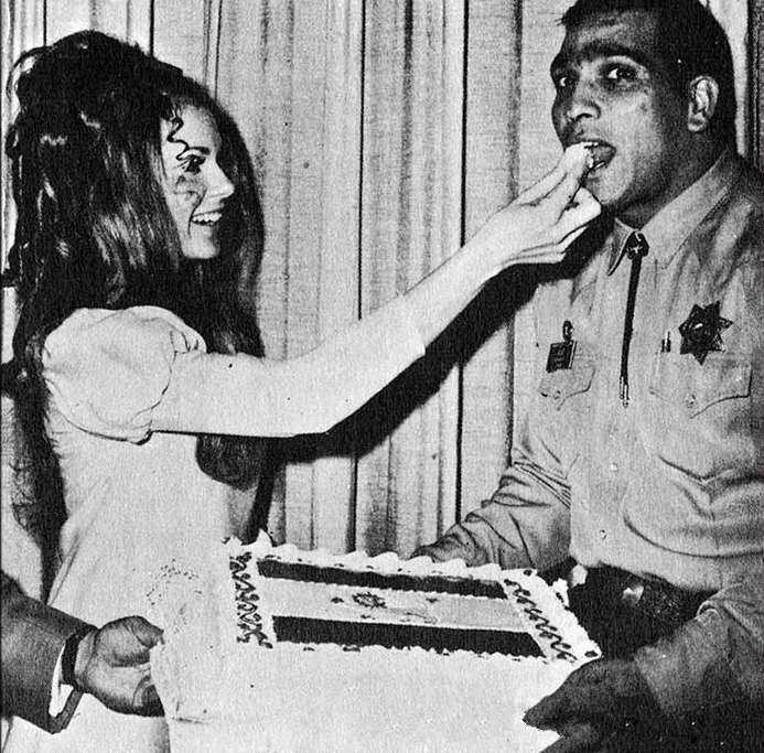 Tanya Wilson and Jalal Keshmiri